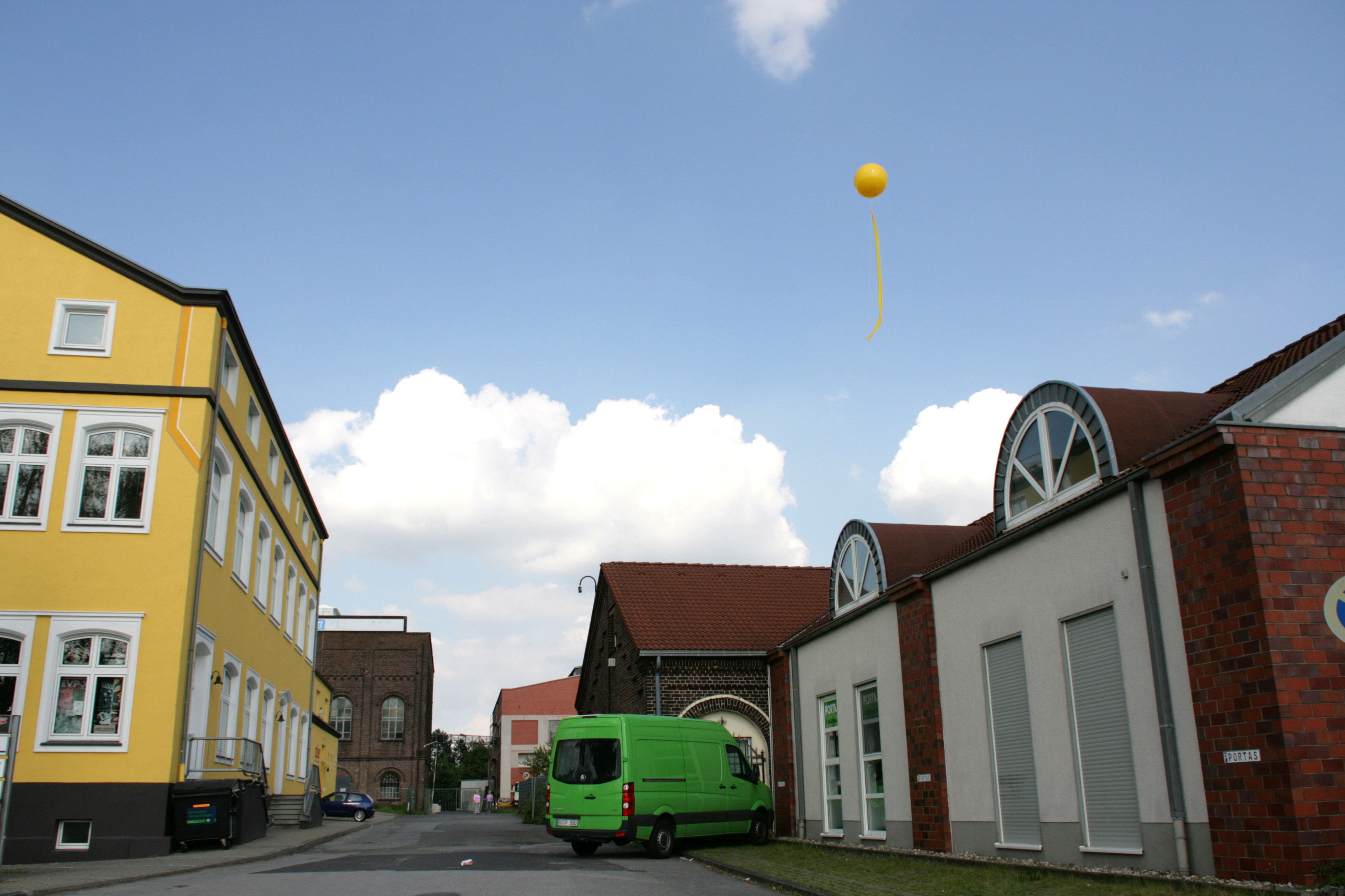 Schachtzeichen bei Zeche Fröhliche Morgensonne in Bochum-Wattenscheid